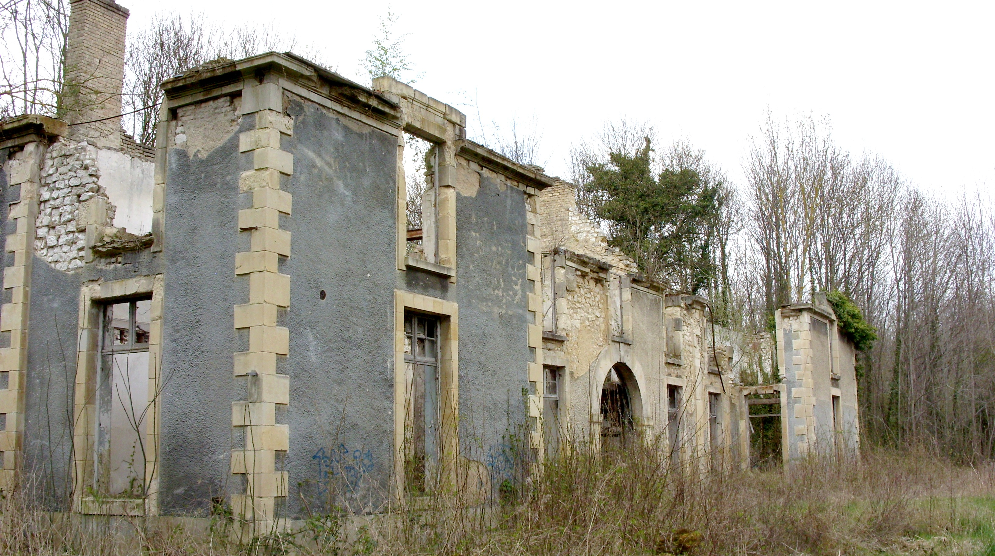 Château de la Malle à Saint Brice Courcelles